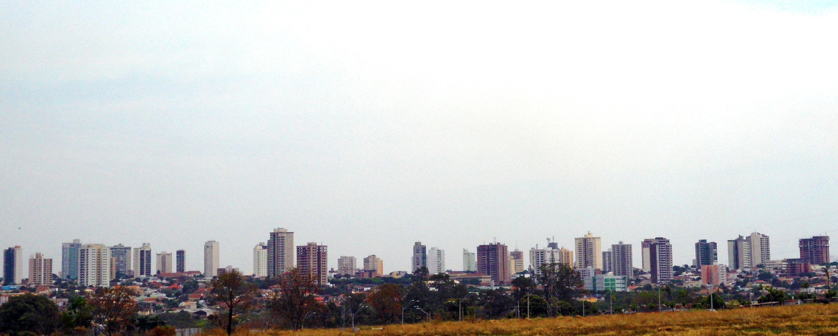 Panorâmica parcial de Araçatuba-SP.